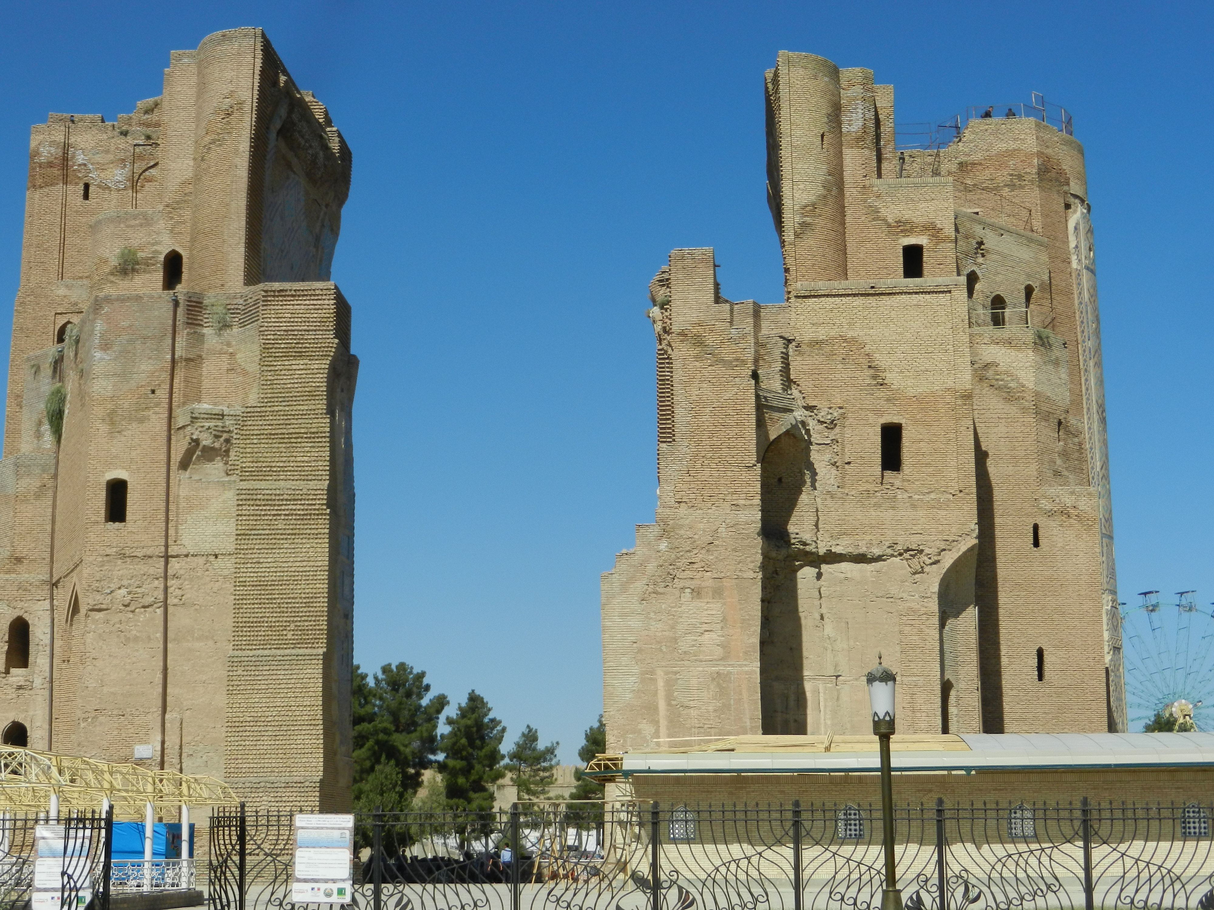 Ostanki Ak Saraja v Shakhrisabzu